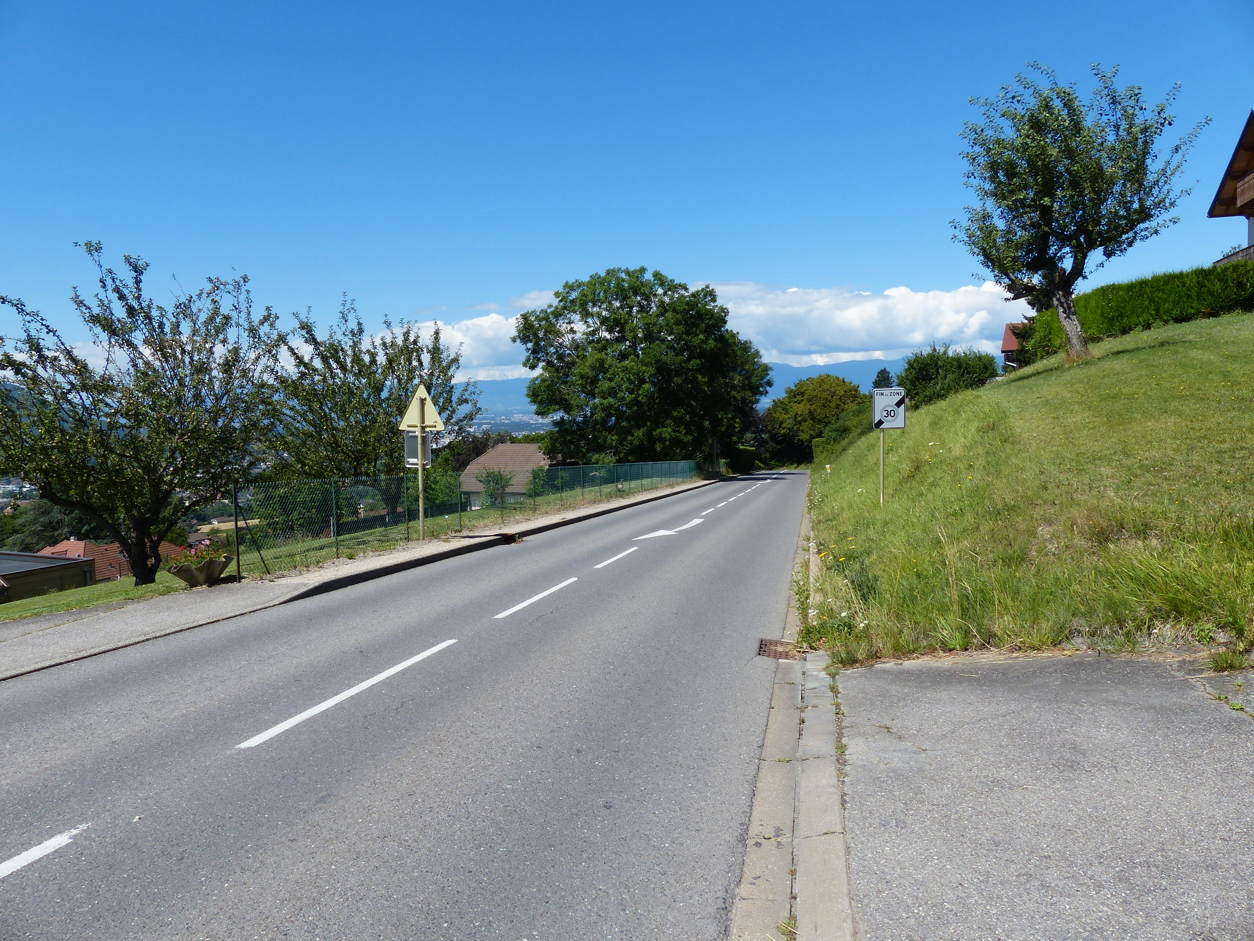 Panneau B51 à Lucinges, France